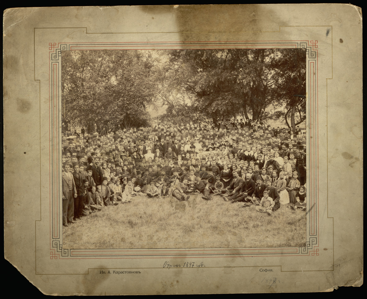 Честване на Св. Св. Кирил и Методий в Одрин в 1897 г.